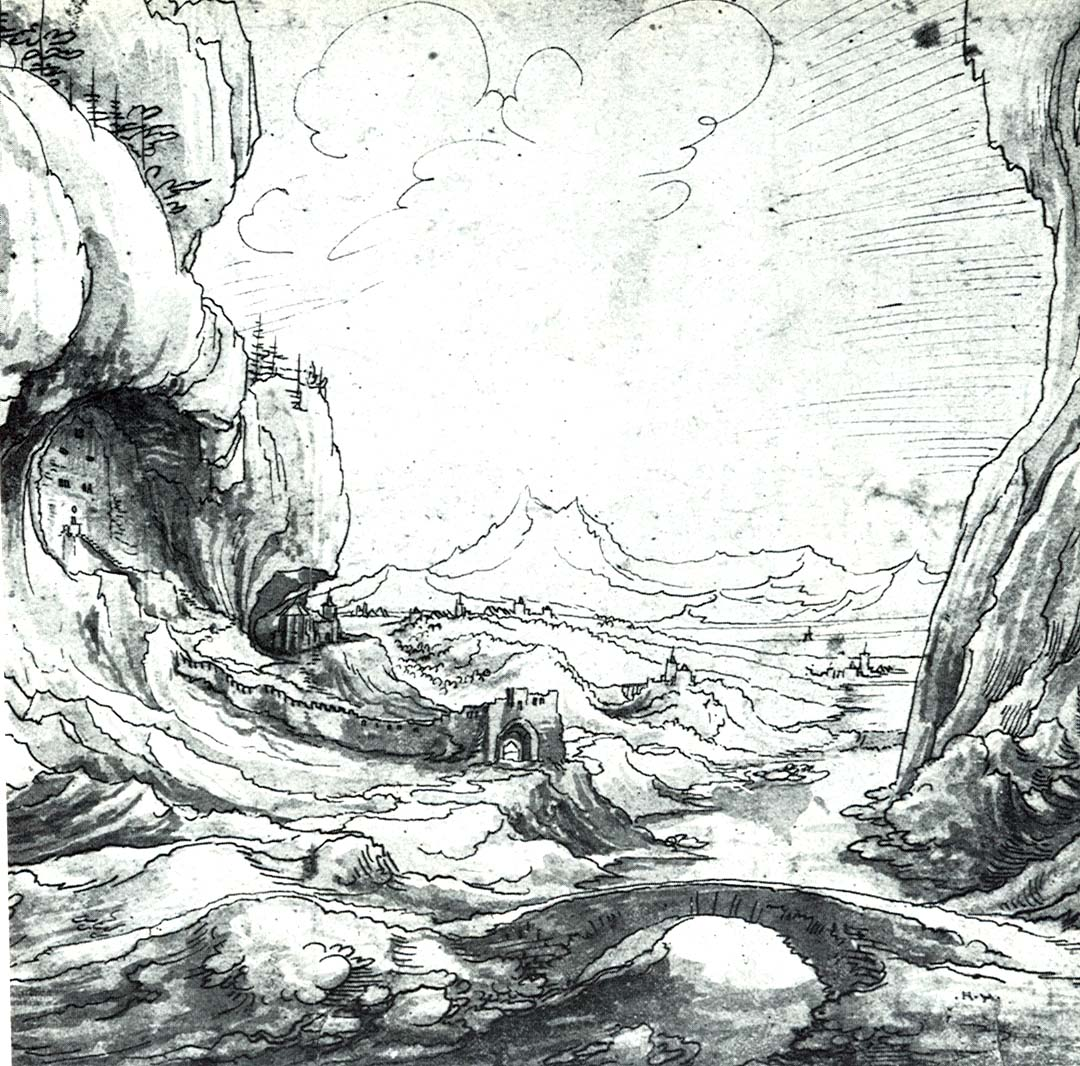 Letzimauer bei Fracstein, 1552